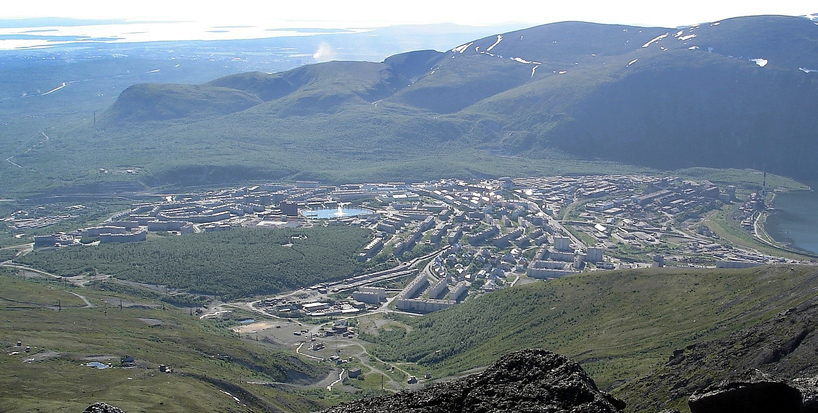 Кировск, вид с горы Айкуайвенчорр, лето 2005г.